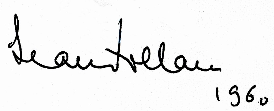 Signature du poète Jean Follain, scan d'un livre dédicacé. This signature is believed to be ineligible for copyright and therefore in the public domain because it falls below the required level of originality for copyright protection both in the United States and in the source country (if different). In this case, the source country (e.g. the country of nationality of the signatory) is believed to be France. Cette image ou le texte qui y est représenté est seulement composé de formes géométriques simples et de texte. Elle n’atteint pas le seuil d'originalité nécessaire pour la protection du droit d’auteur, et est donc du domaine public.